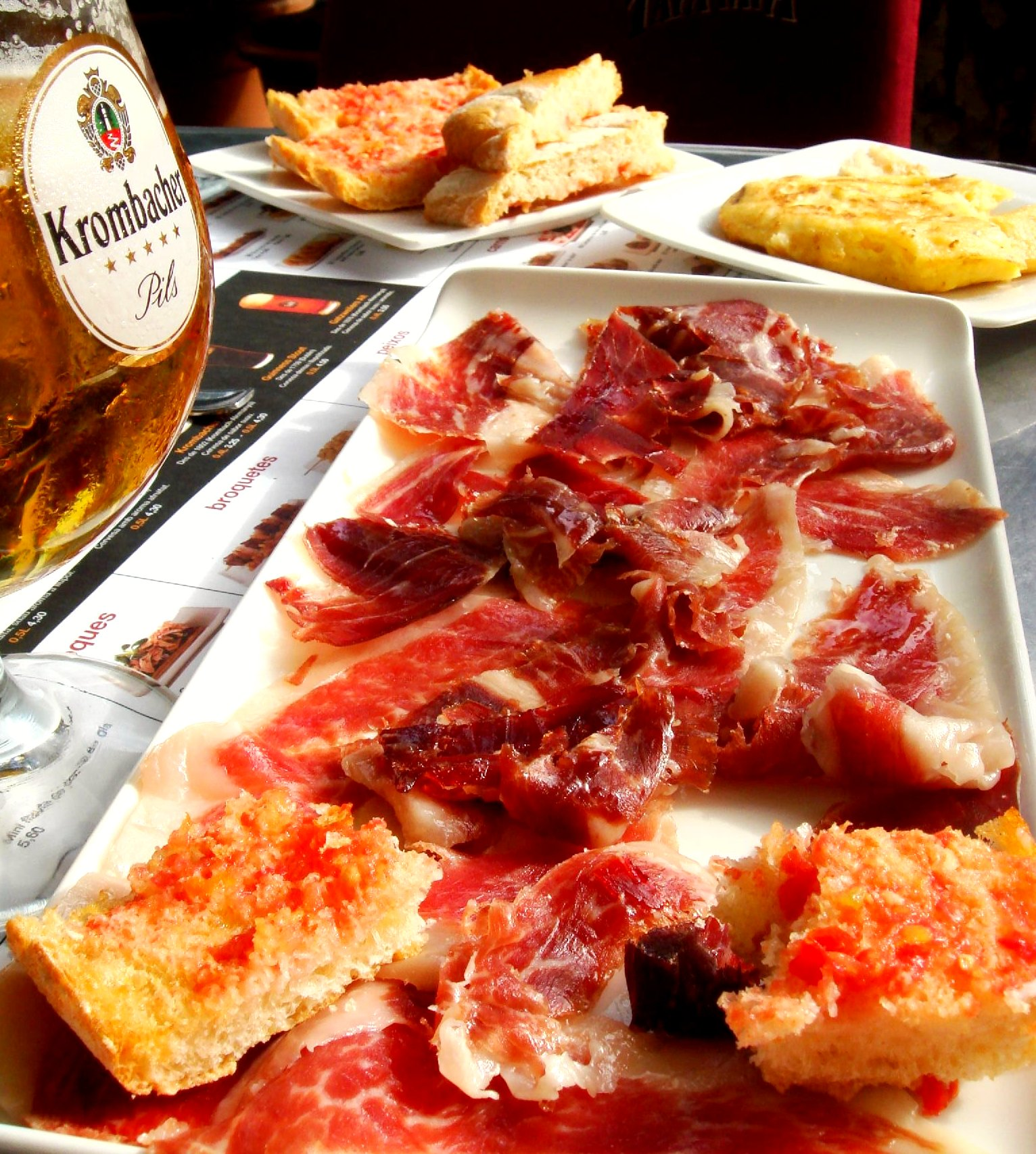 Tortilla, pan con tomate y jamón ibérico en el Passeig de Gracia de Barcelona.